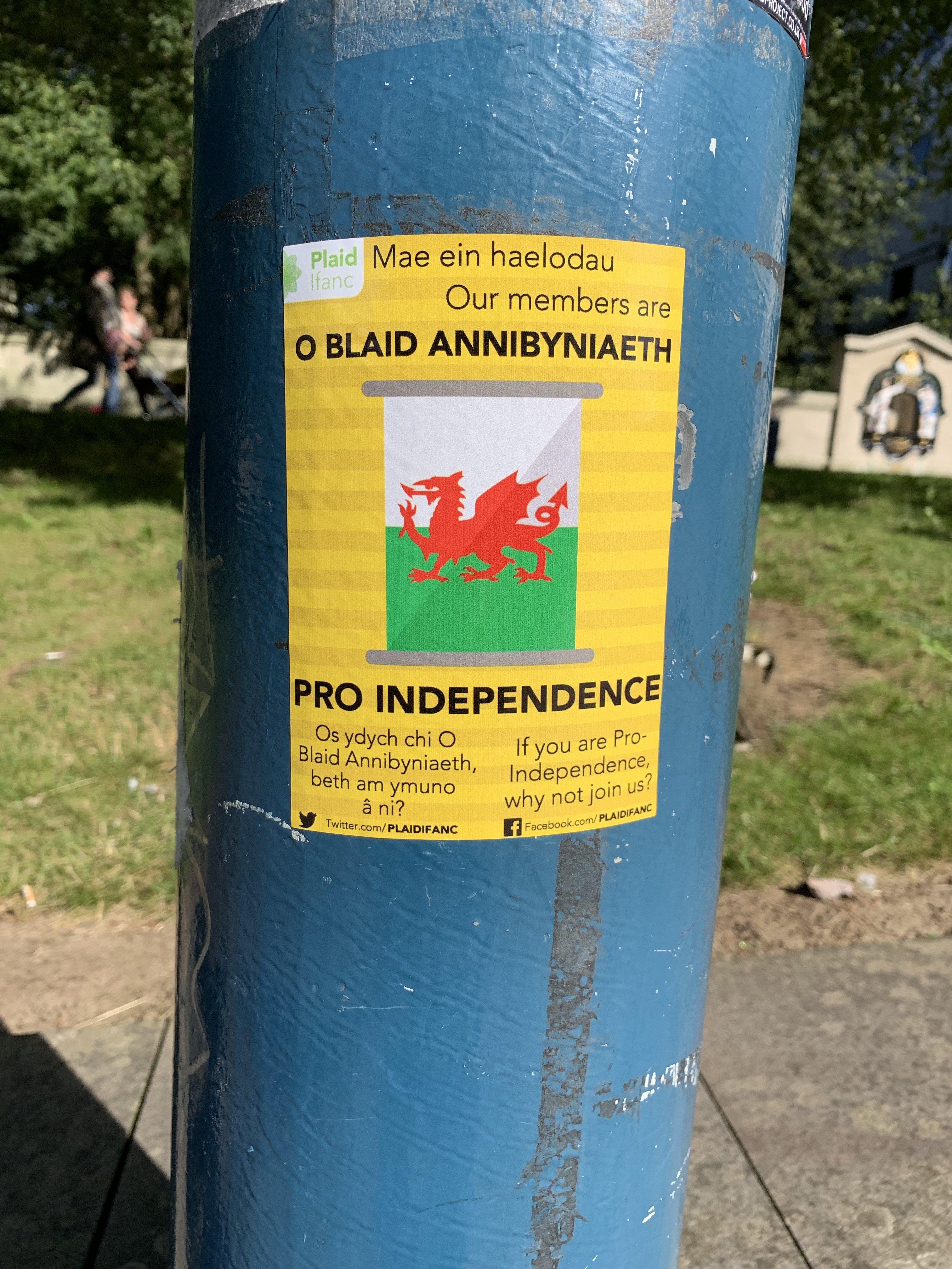 Sticer o blaid Annibyniaeth a welwyd yng nghanol y prof ddinas Caerdydd